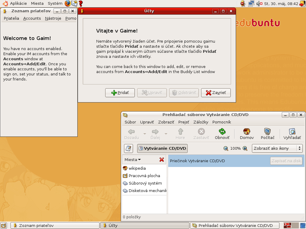 Edubuntu Feisty - Slovak - Gaim a napaľovanie